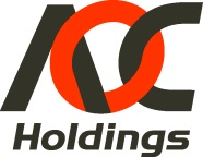 AOCHDロゴマーク